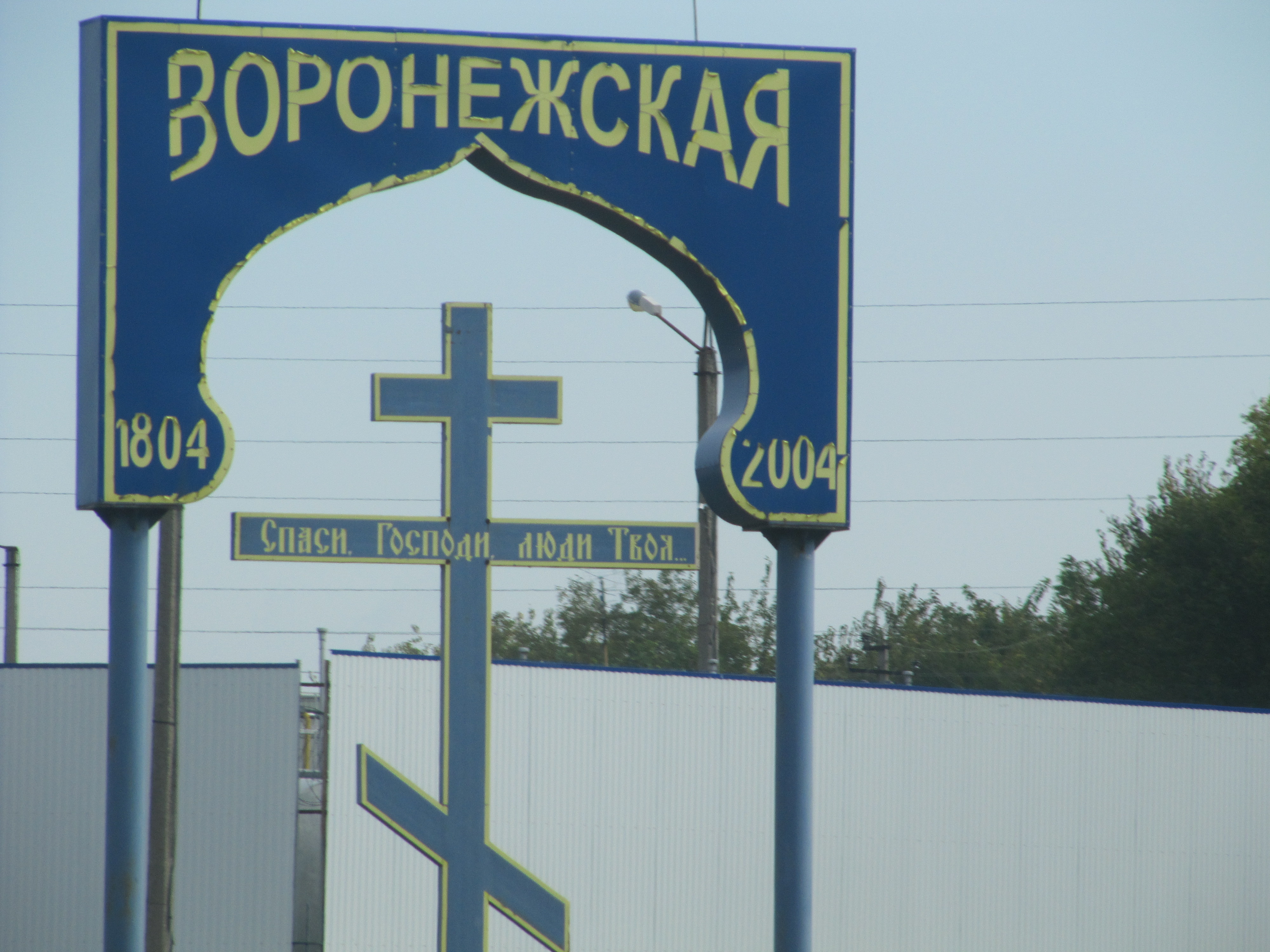 Станица Воронежская